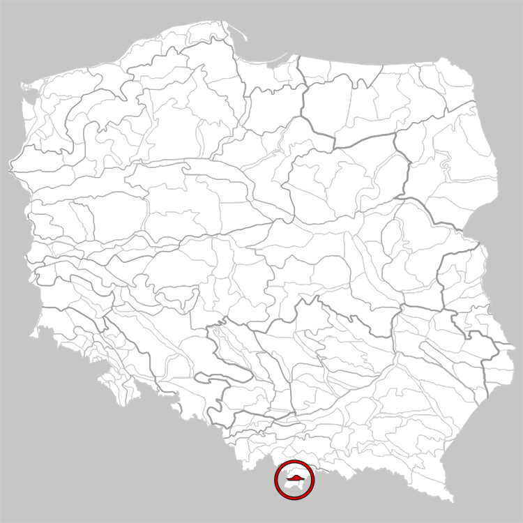 Physico-geographical regionalization of Poland Mezoregion 514.14 Subtatran Ditch Regionalizacja fizycznogeograficzna Polski Mezoregion 514.14 Rów Podtatrzański